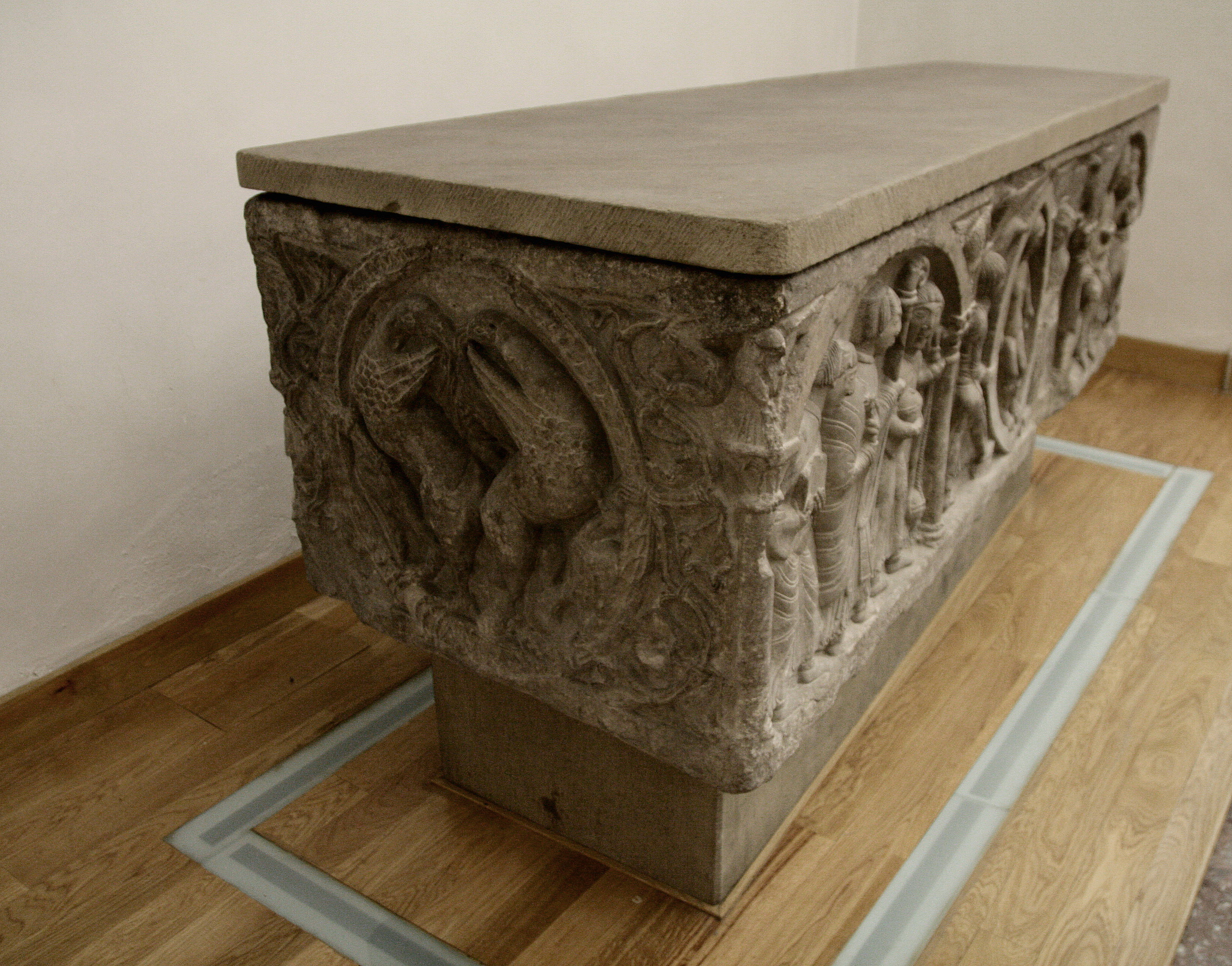 Sarcófago de doña Sancha expuesto en el Monasterio de las Benedictinas de Jaca (Huesca)